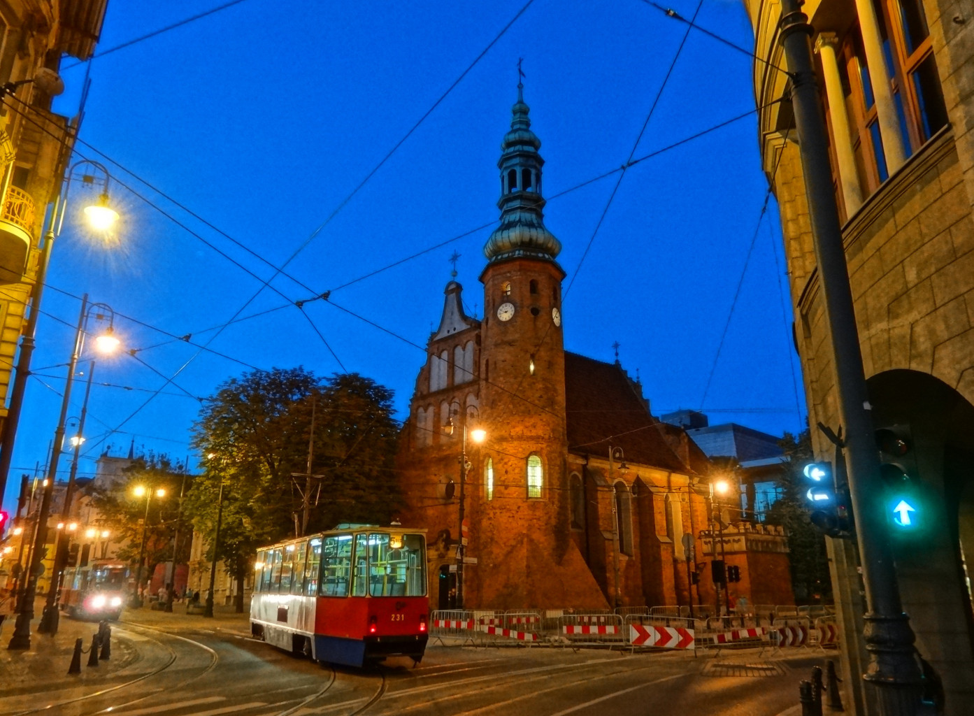 Kościół p.w. Wniebowzięcia Najświętszej Marii Panny w Bydgoszczy (zbud. 1582-1615, do 1835 r. kościół klasztorny klarysek bydgoskich)